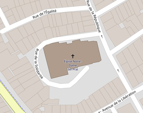 Situation de l'église Notre-Dame del Prat à Argelès-sur-Mer This map may be incomplete, and may contain errors. Don't rely solely on it for navigation.